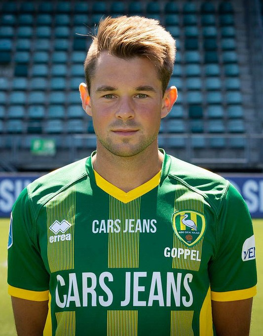 Thijmen Goppel